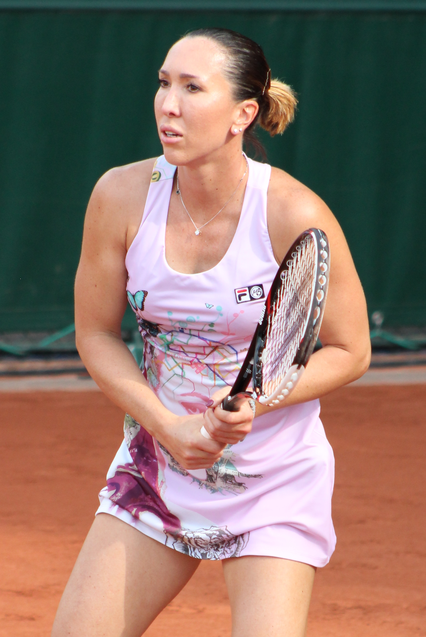 Jankovic RG16 (11)